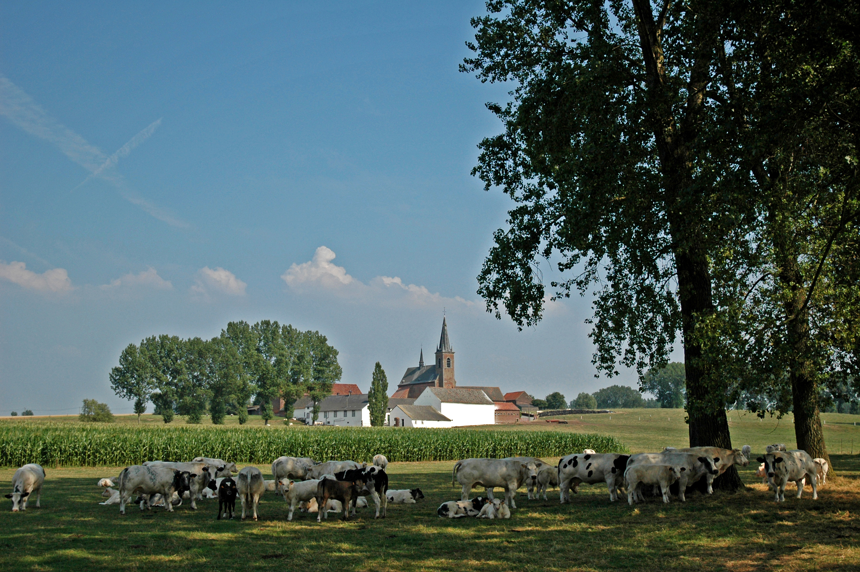 Cantimpré-site Bellingen: hoeve en kerk midden het unieke en open landschap van het Pajottenland Cantemprestraat 1 te 1674 Bellingen (Pepingen) Samen met de kerk vormt dit hoevecomplex een indrukwekkend geheel in het landschap. Beide maakten deel uit van de voormalige priorij gesticht in 1182 als afhankelijkheid van de Augustijnerabdij van Cantimpré (Kamerijk), en kende een snelle bloei dankzij de gunst en de bescherming van de heren van Edingen. Na de verwoesting in 1580 van de abdij van Cantimpré zelf, wordt Bellingen verheven tot abdij tot 1765. Uiteindelijke opheffing van de abdij door de Franse revolutie in 1796. De Onze-Lieve-Vrouwkerk werd in 1943 beschermd als monument en is gerestaureerd. Ernaast is de voormalige abdijhoeve gesitueerd waarvan de huidige gebouwen dateren uit het begin van de 19de eeuw. Op het erf liggen arduinstenen met het jaartal 1609 als opschrift. In 1983 werd de abdijhoeve beschermd als monument en de omgeving als dorpszicht. Inventaris Onroerend Erfgoed: en This photo of immovable heritage has been taken in the Flemish Region